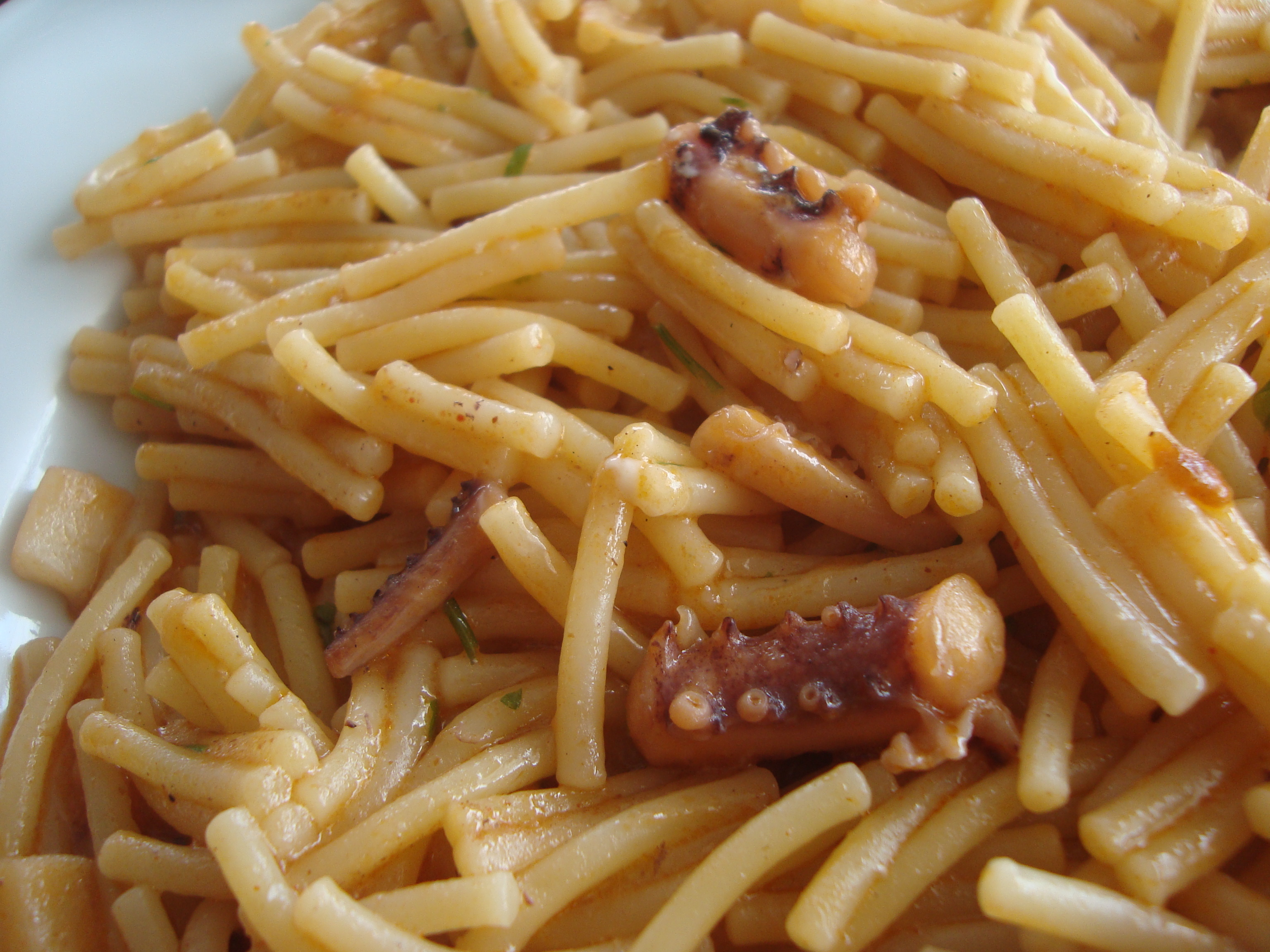 Fideuà con pulpo de Benicarló (Comunidad Valenciana)